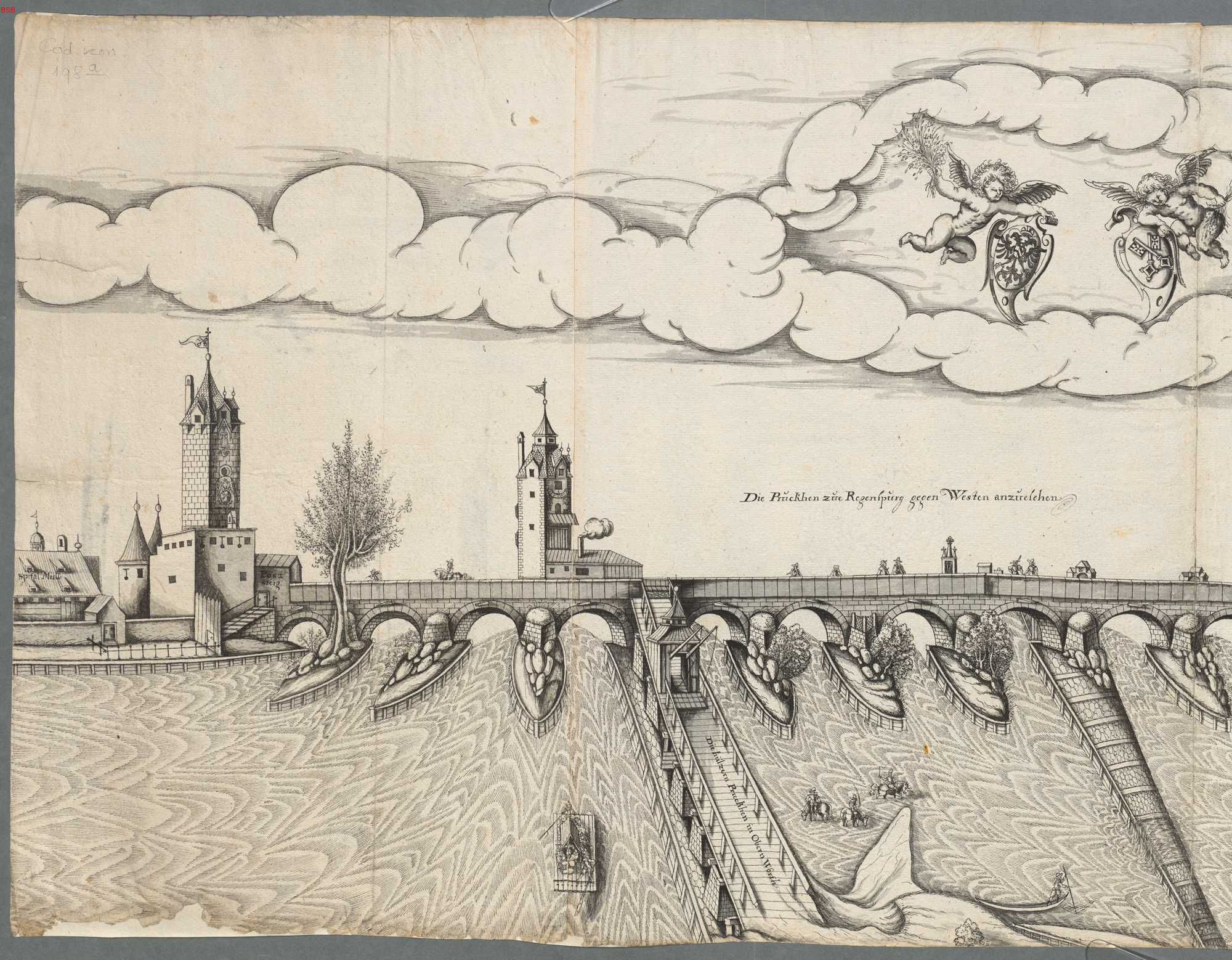 Abriß der Stadt Regensburg östlich und westlich der Steinernen Brücke. Steinerne Brücke gegen Westen. Beschriftung: Die Pruckhen zu Regenspurg gegen Westen anzusehen. Die hülzern Pruckhen in Obern Wöhrd (Hölzerne Brücke zum Oberen Wöhrd)